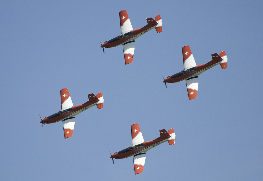 20100626-_DSC7434